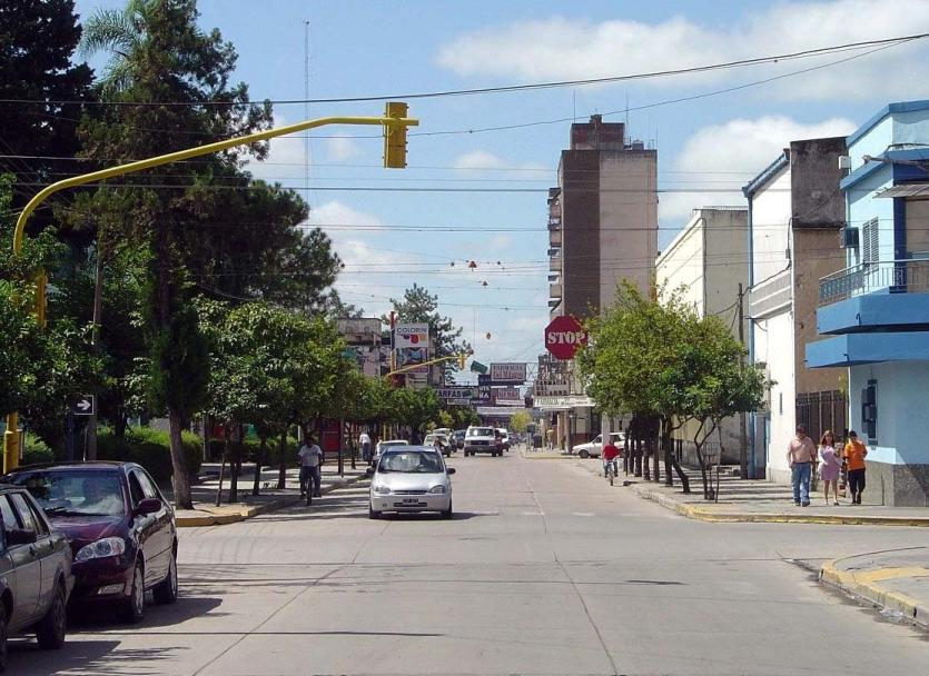 San Martín Street, Concepción, Tucumán Province, Argentina. Author: jlazarte